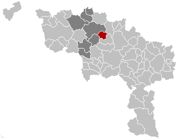 Carte indiquant la localisation de la commune de Brugelette dans la Province de Hainaut.